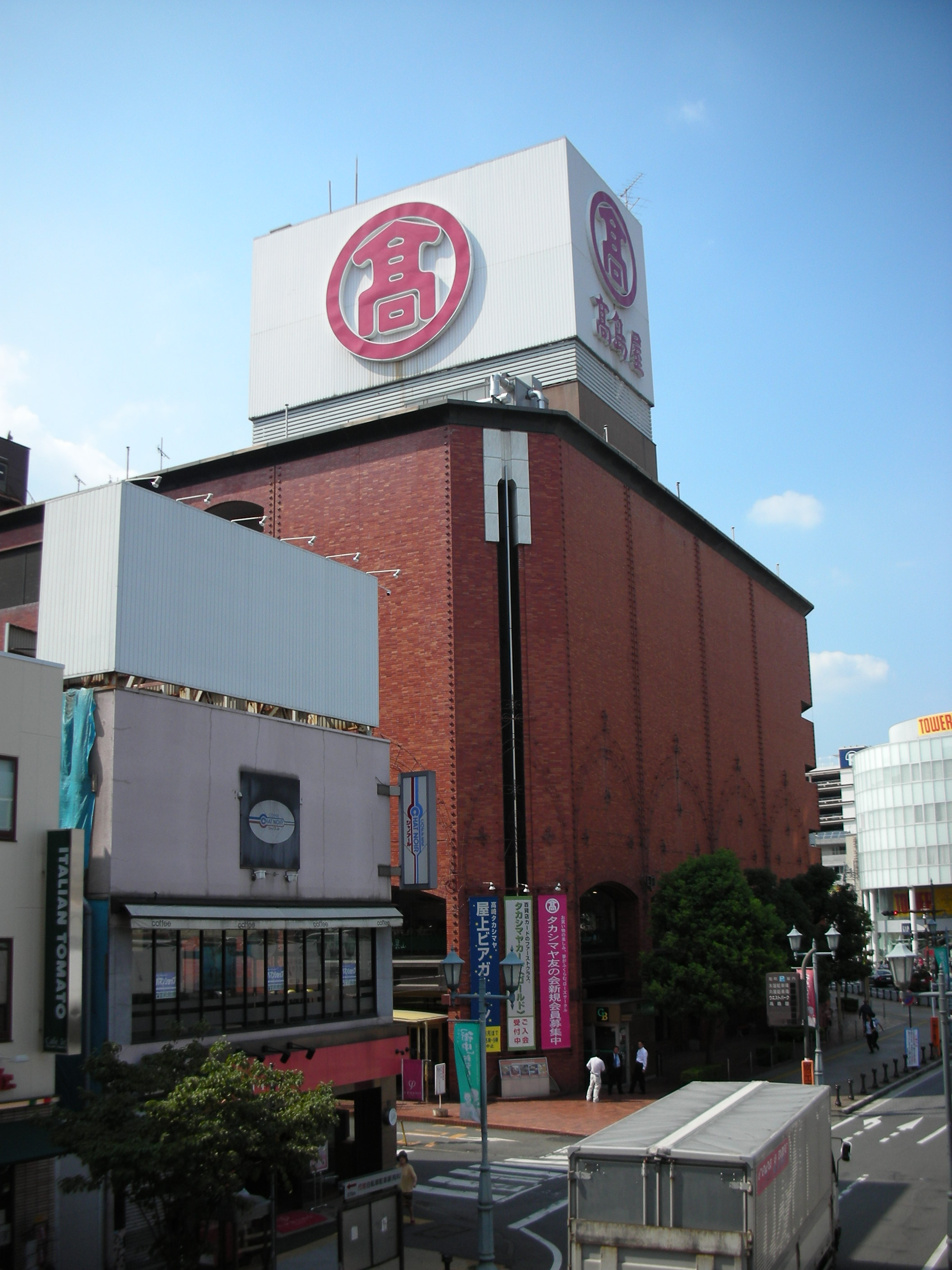 高島屋高崎店の外観